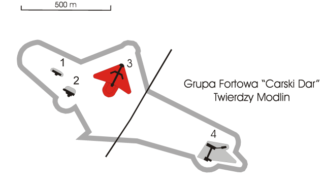 Schemat obrazujący położenie Fortu XV Twierdzy Modlin wewnątrz Grupy Fortowej "Carski Dar". Autor:Zbigniew Strucki